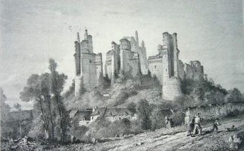 Vue des ruines du château de Pierrefonds, vers 1860